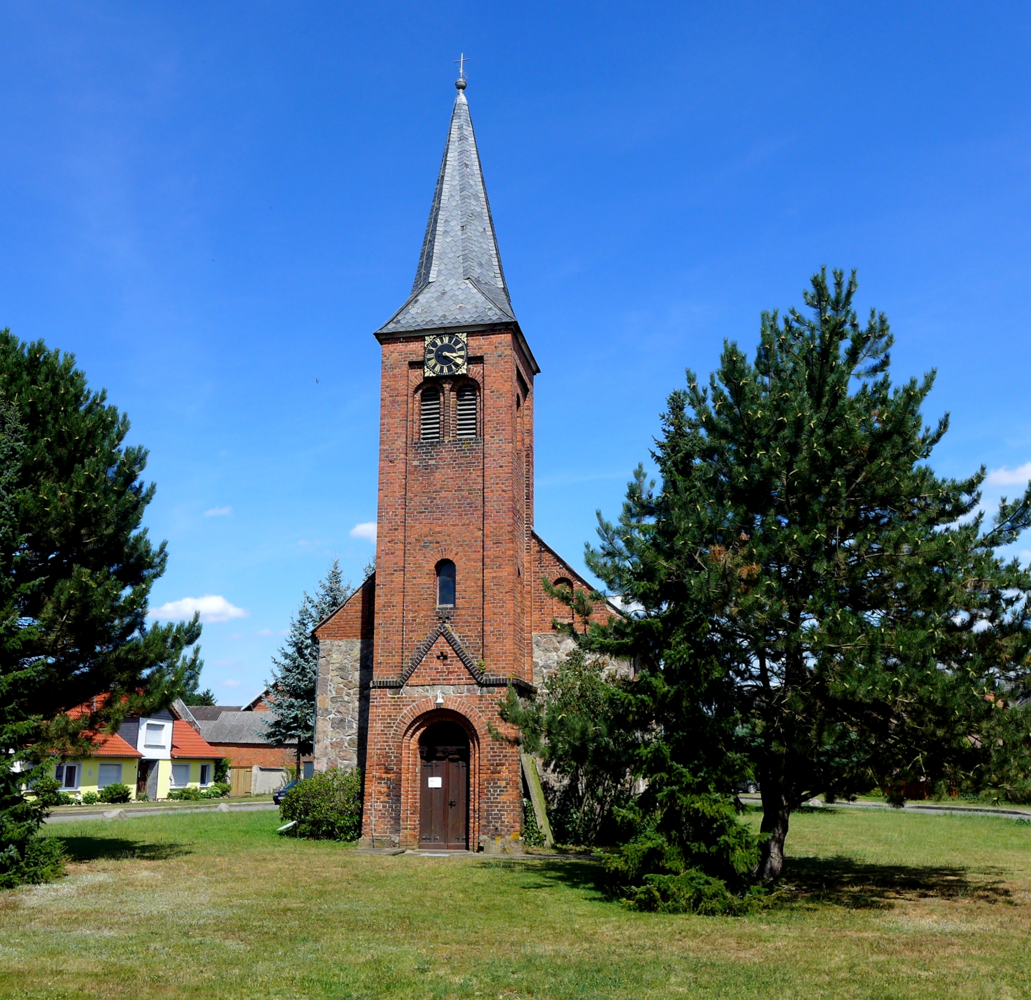 Ev.-Luth. Kirche an der Dorfstraße von Hanum, Sachsen-Anhalt. Aufnahmedatum 2016-07.